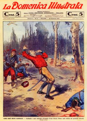 La Domenica Illustrata - Death of Bruno Garibaldi